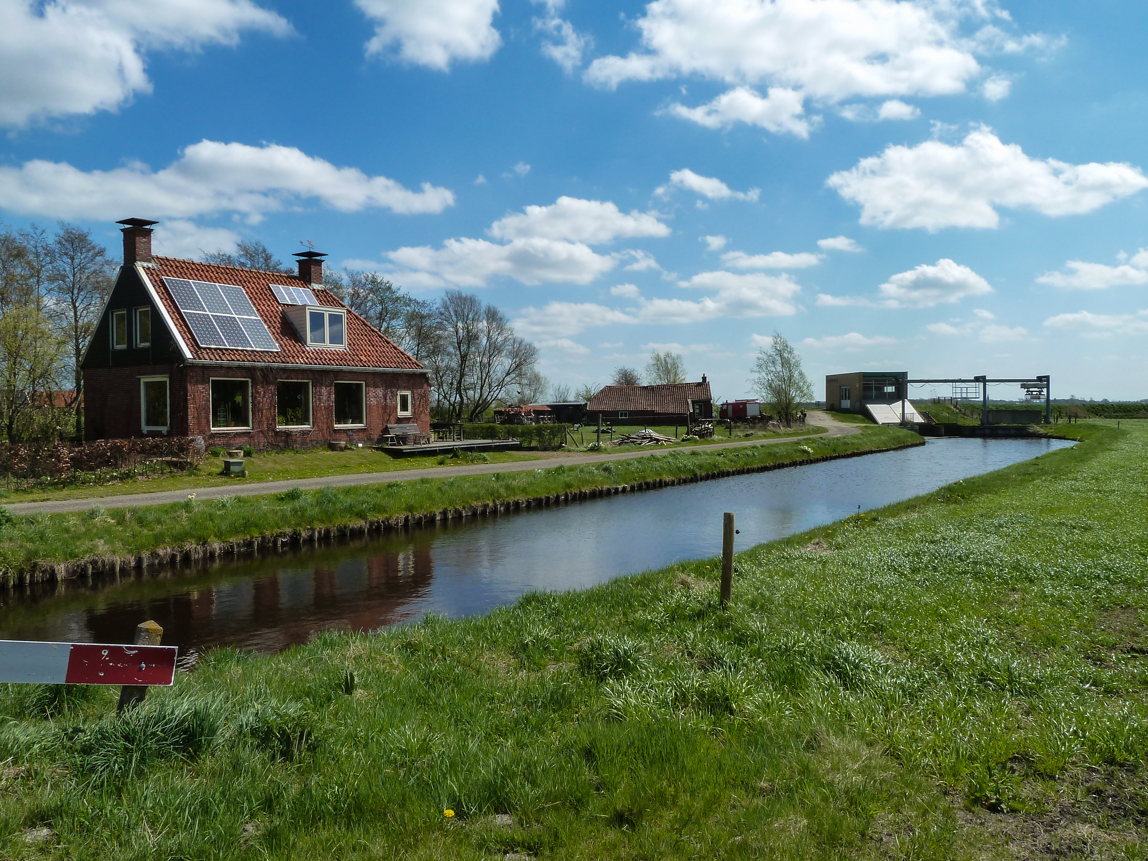 Gemaal De Blauwe Molen nabij het Afwateringskanaal van Duurswold